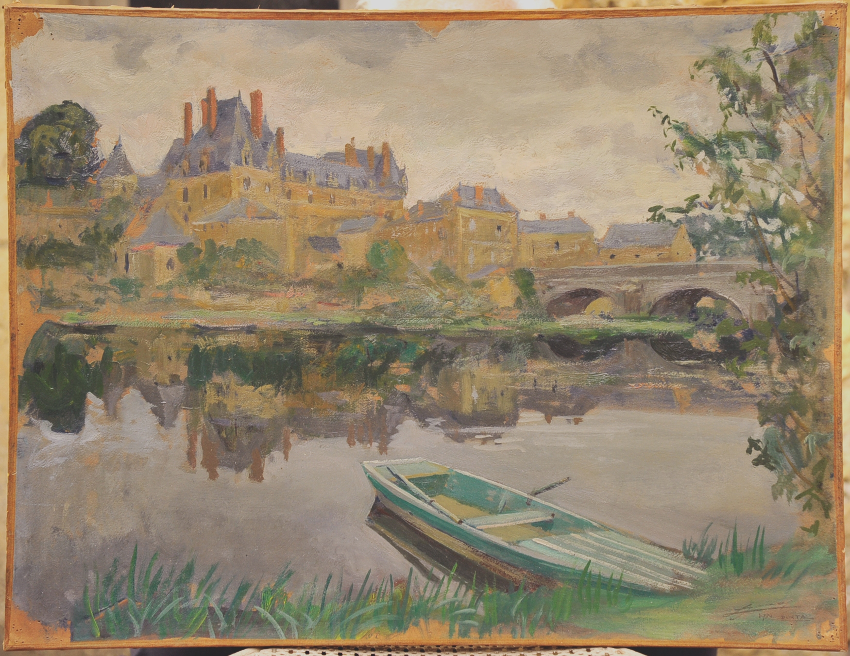 huile sur toile 50 x 65 - signée Lucien Jonas - datée 1934